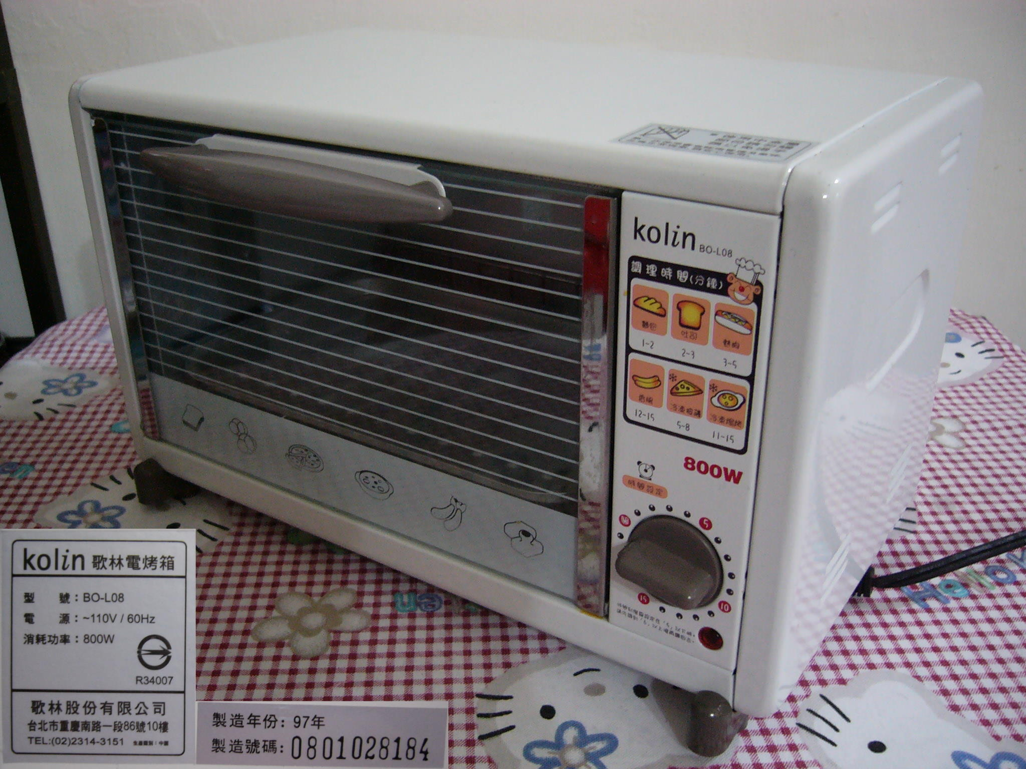 2008年製造的歌林電烤箱BO-L08。